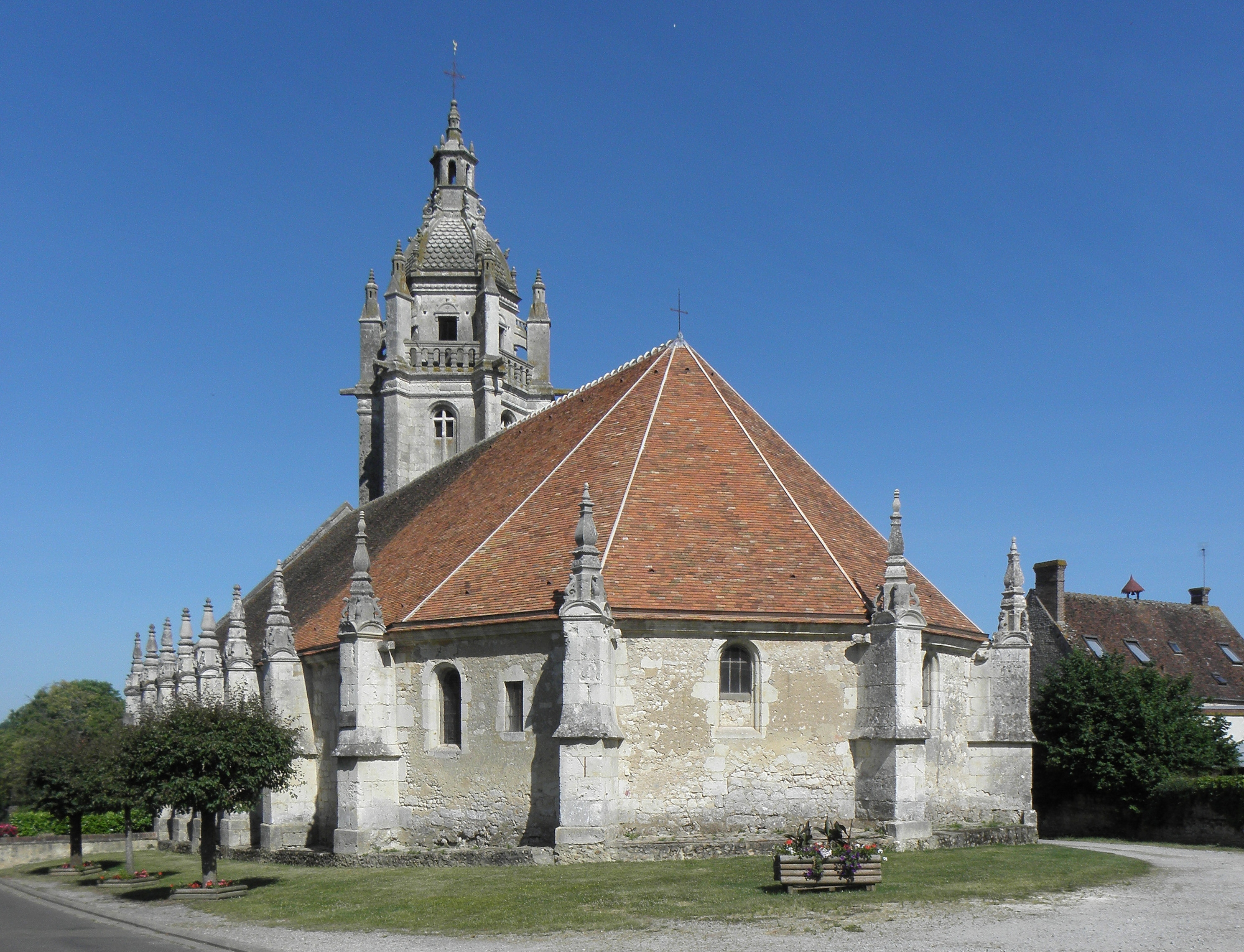 Église Notre-Dame de Courgeon (61). Chevet.